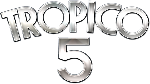 Logo von Tropico 5